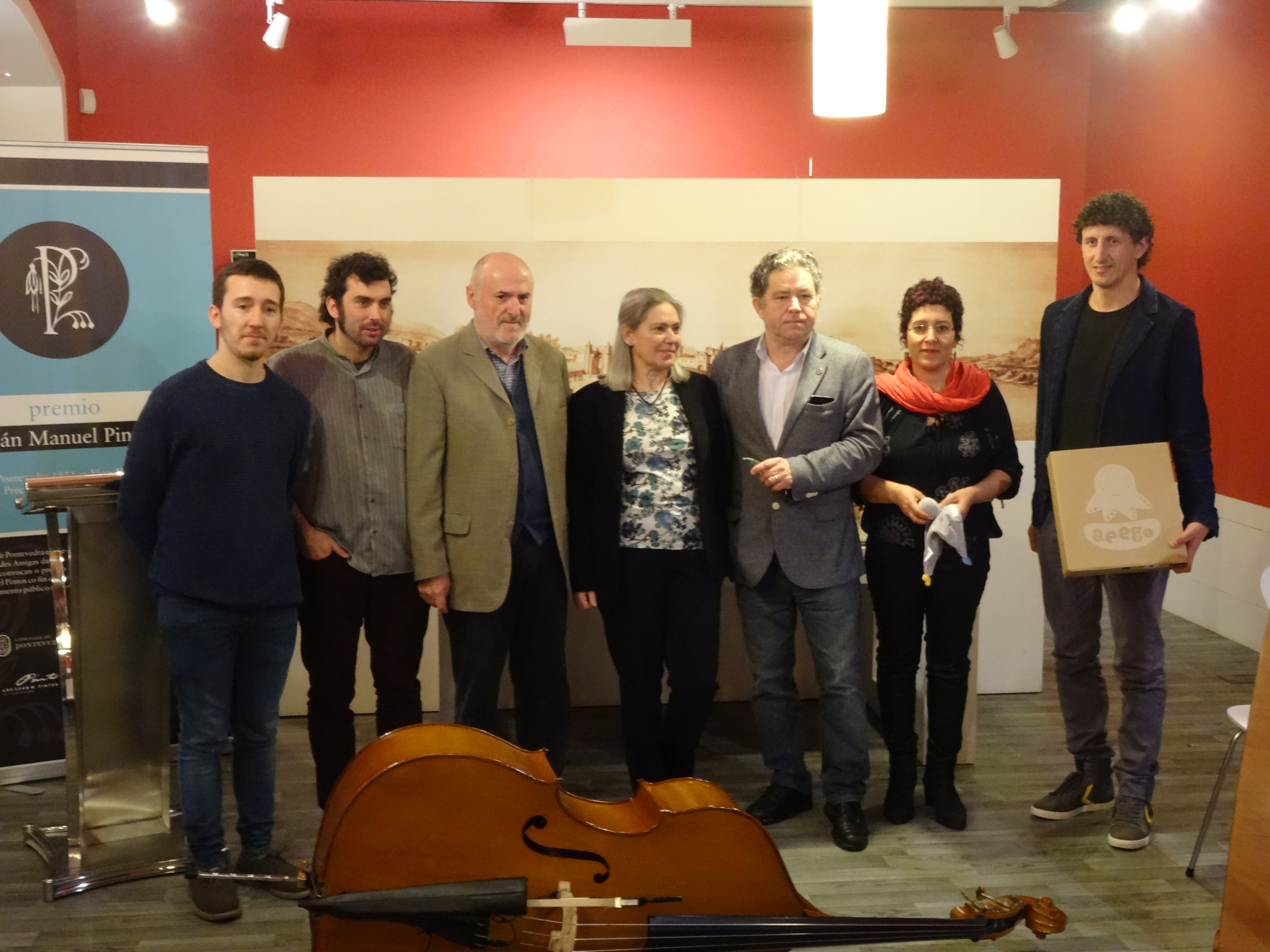 Premiados co premio Xoán Manuel Pintos do 2018.